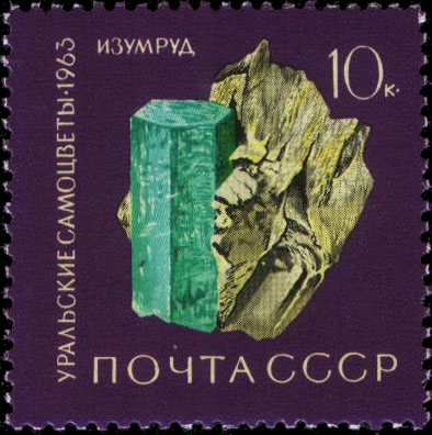 Марка СССР 1963 года из серии «Уральские самоцветы». Изумруд. Художник — Н.Круглов. Номер ЦФА — 2953. Тираж — 3 млн.